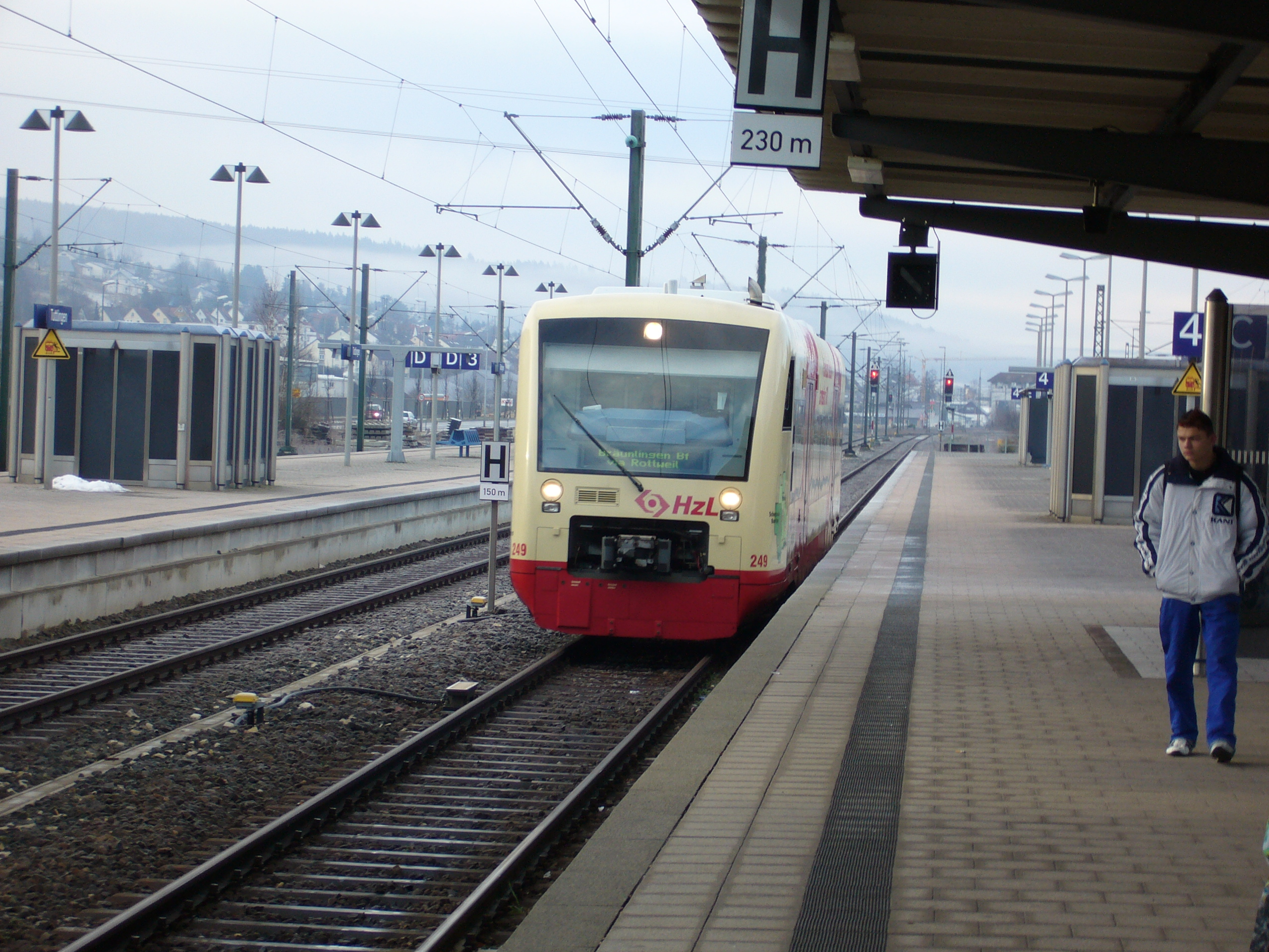 Ringzug im Bahnhof Tuttlingen zur Weiterfahrt auf der Gäubahn